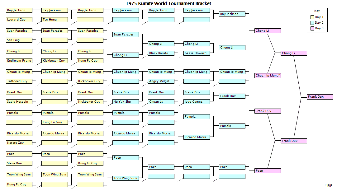 Kumite Bracket